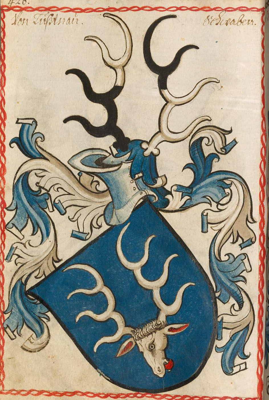 Scheibler'sches Wappenbuch, älterer Teil Lustnau